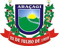 Brasão de Armas do Município de Araçagi no Estado da Paraíba, Brasil.